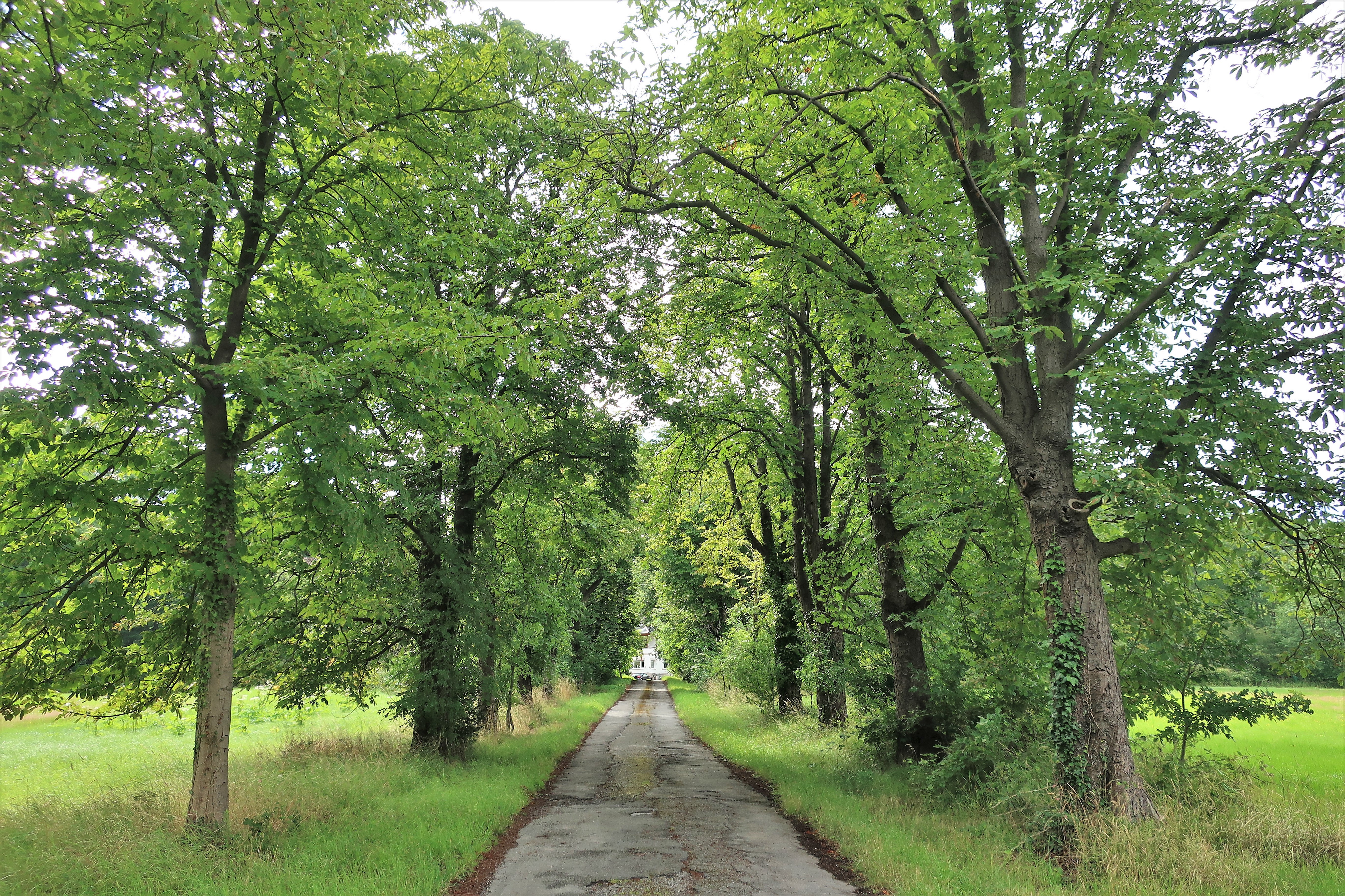 Geschützte Rosskastanienallee Zufahrt Gut Schönfeld in Hagen-Vorhalle, Volmarsteiner Straße. Länge: 176 m (Alleenkataster NRW AL-HA-0005). Auch geschützter Landschaftsbestandteil „Allee Gut Schönfeld“. Auf dem Foto links von der Allee befindet sich der geschützte Landschaftsbestandteil „Wald und Teiche Gut Schönfeld“. Dabei handelt es sich um einen Laubwald mit einigen Kiefern, in dem 5 Teiche künstlich durch Bachaufstauungen angelegt wurden, sowie um eine Wiesenbrache.